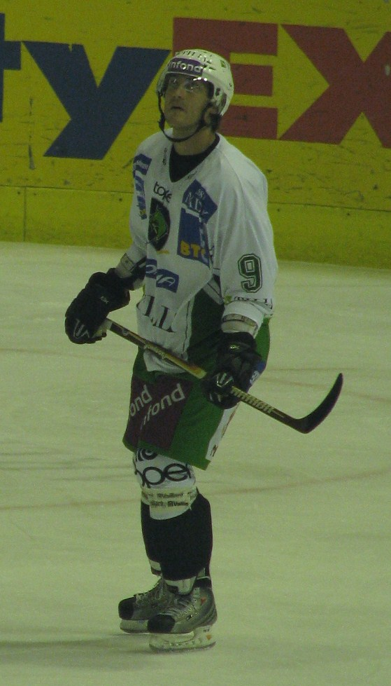 Burke Henry